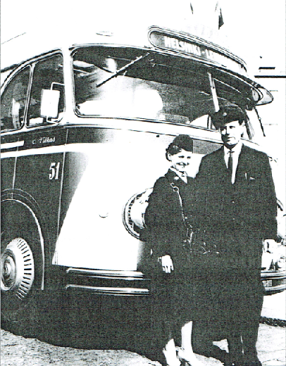 Vaalimaa 1958